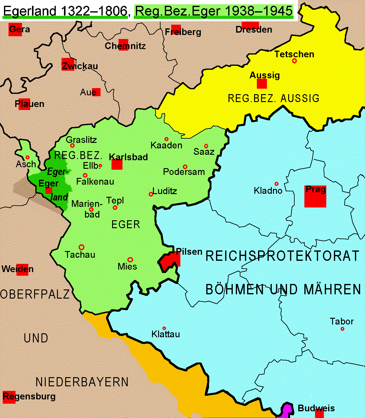 NS occupation "Regierunsgbezirk Eger" 1938–1945 and historical Egerland/Chebsko 1322 –1806